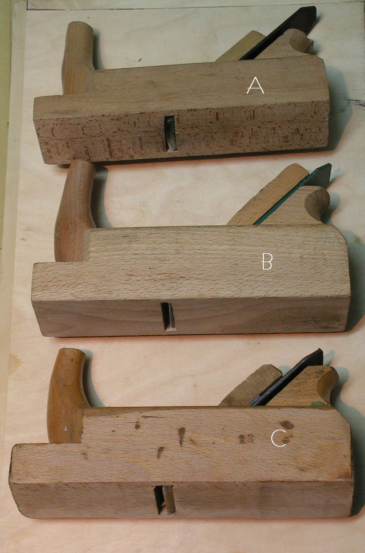 Trzy podstawowe rodzaje strugów. A - zdzierak, B - równiak, C - gładzik. Widok od dołu.